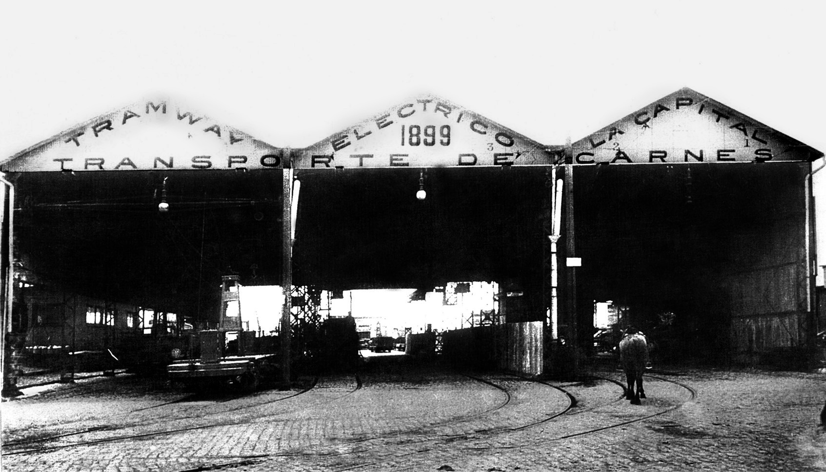 Frente de los hangares de la estación Vail de La Capital en 1900.